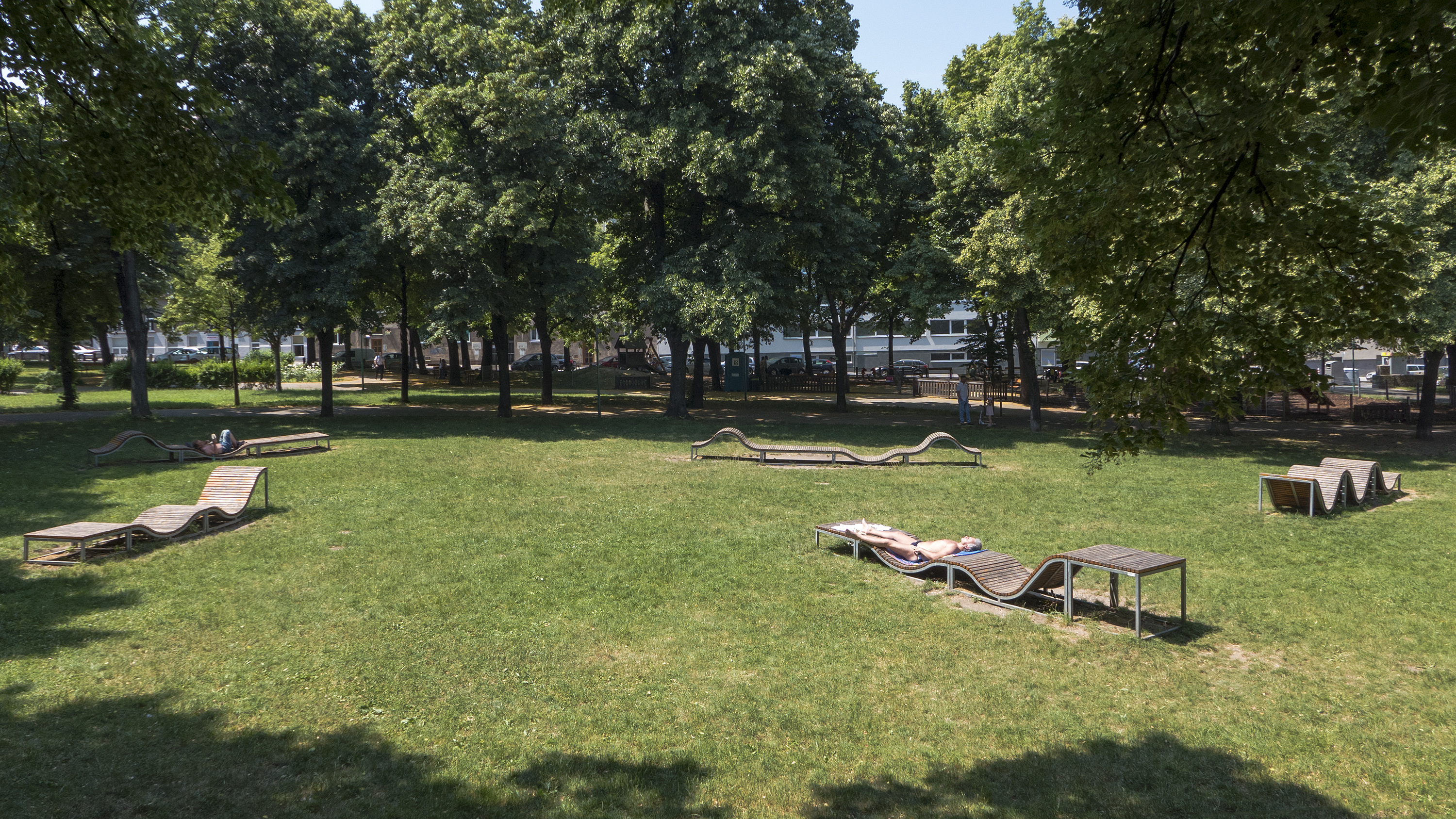 Haydnpark in Wien 12